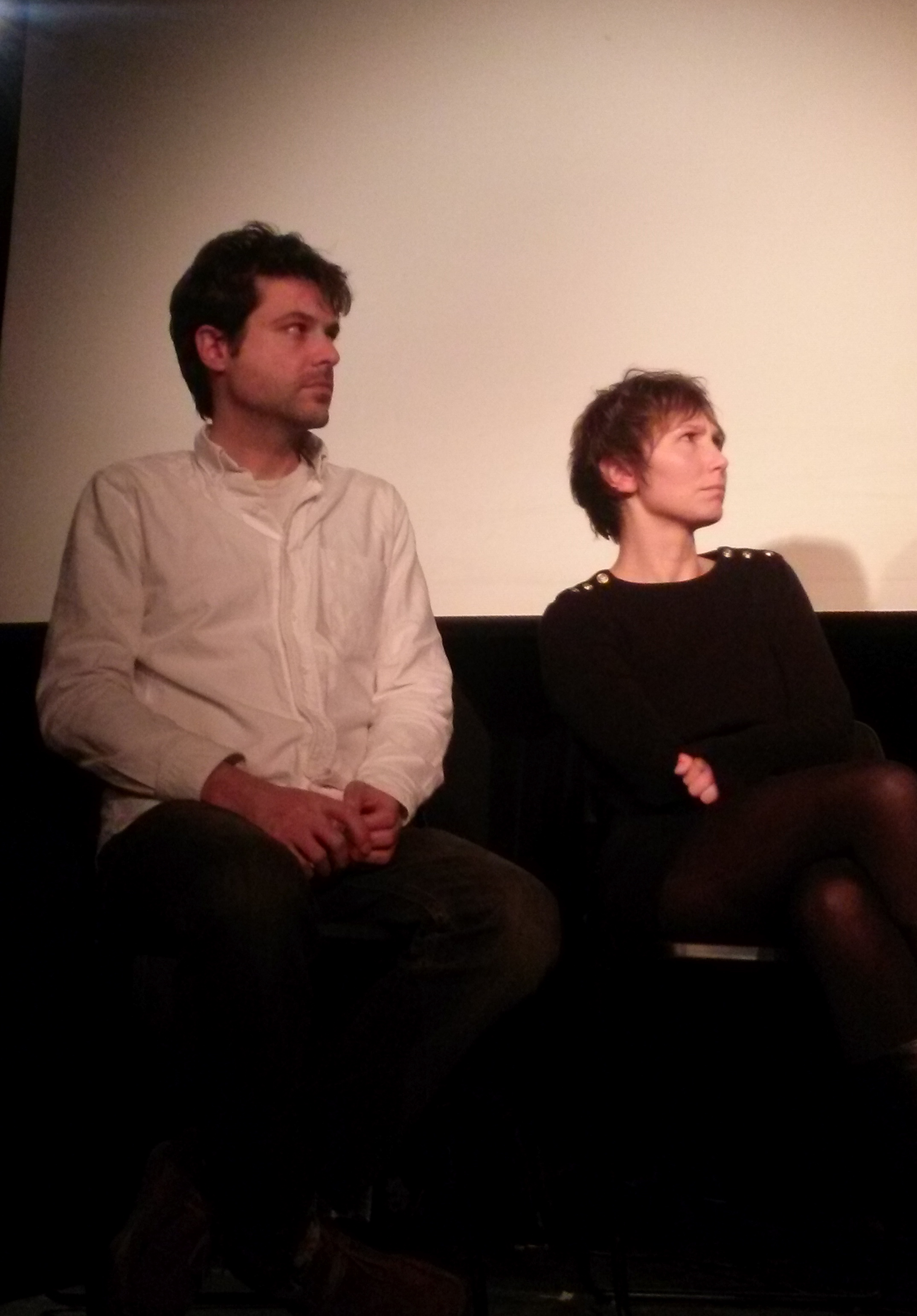 Virgil Vernier et Dinara Droukarova lors d'une projection de Bouge pas, meurs, réssucite à Paris en 2016.